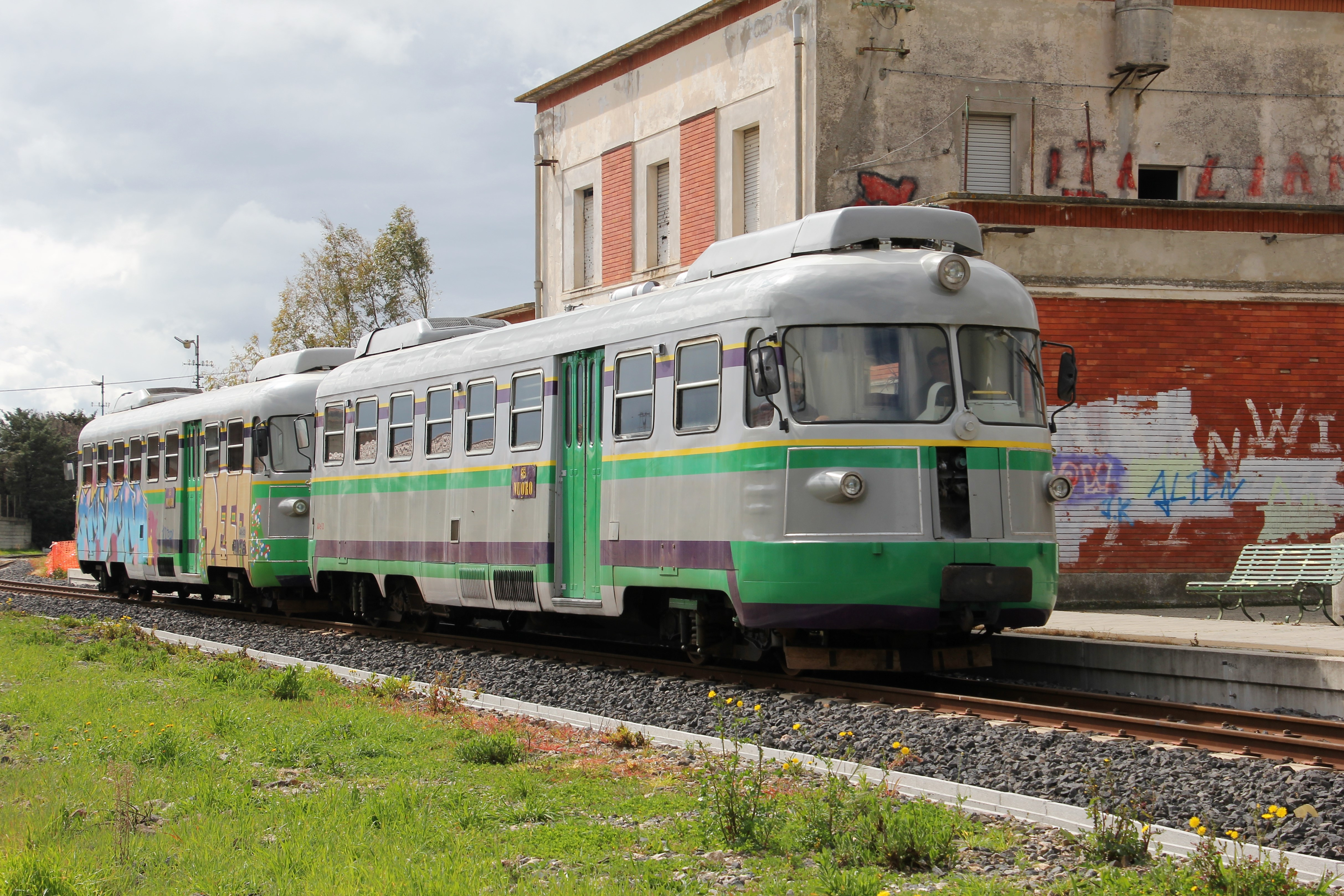 Silanus, stazione ferroviaria